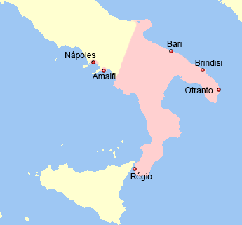 Mapa do Catapanato da Itália